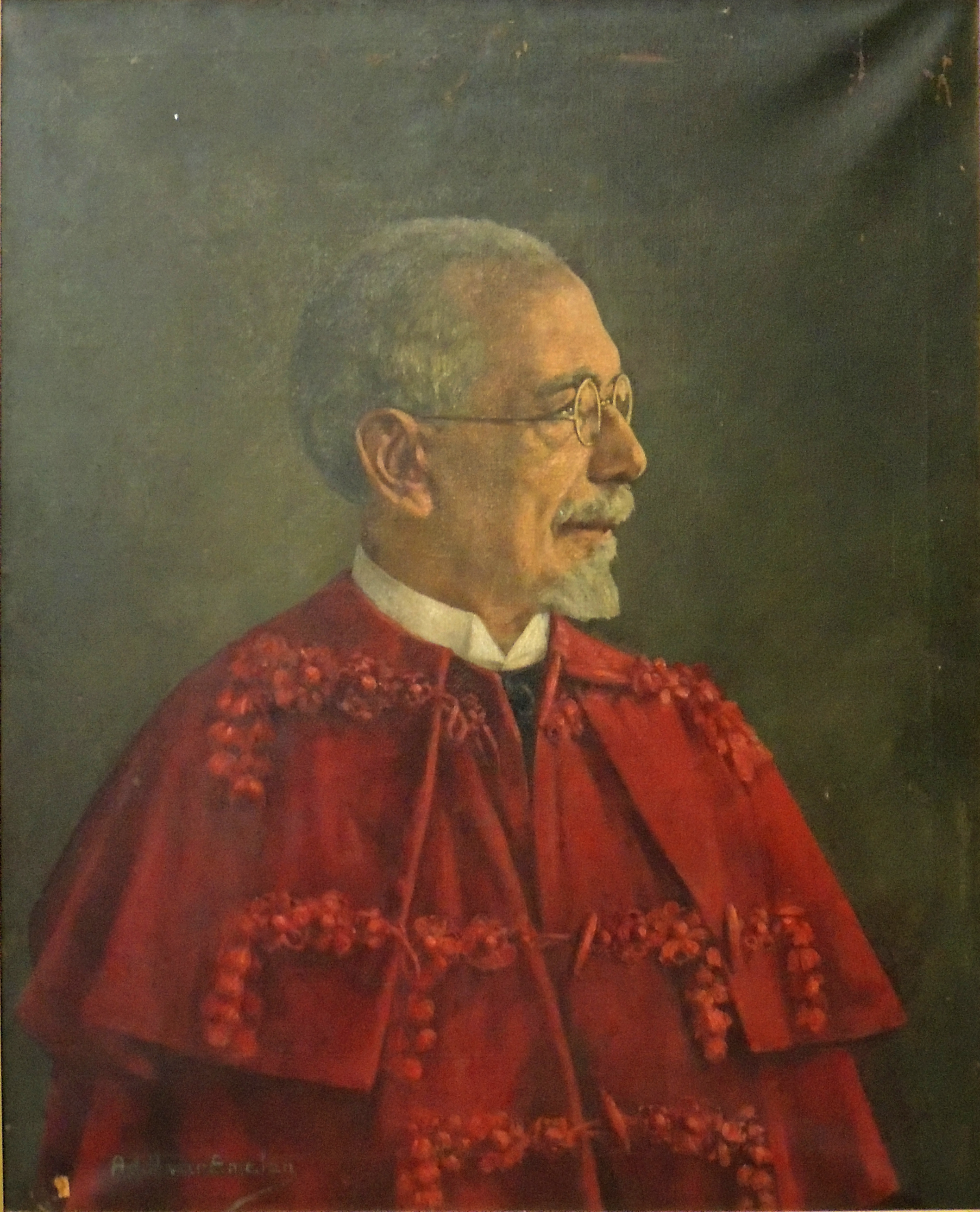 Retrato de Antônio Dino da Costa Bueno, professor e diretor da Faculdade de Direito, primeiro reitor da Universidade de São Paulo. Encontra-se no corredor da Faculdade de Direito - USP, no Largo de São Francisco em São Paulo.